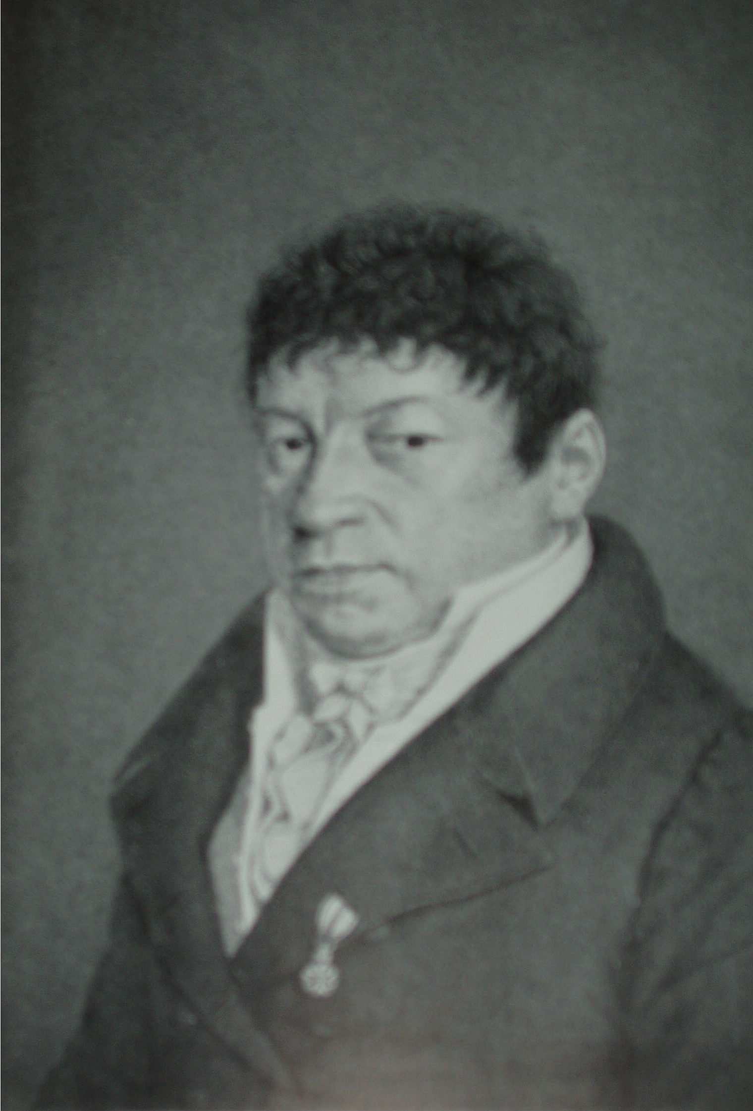 Gemälde von Friedrich von Schlichtegroll